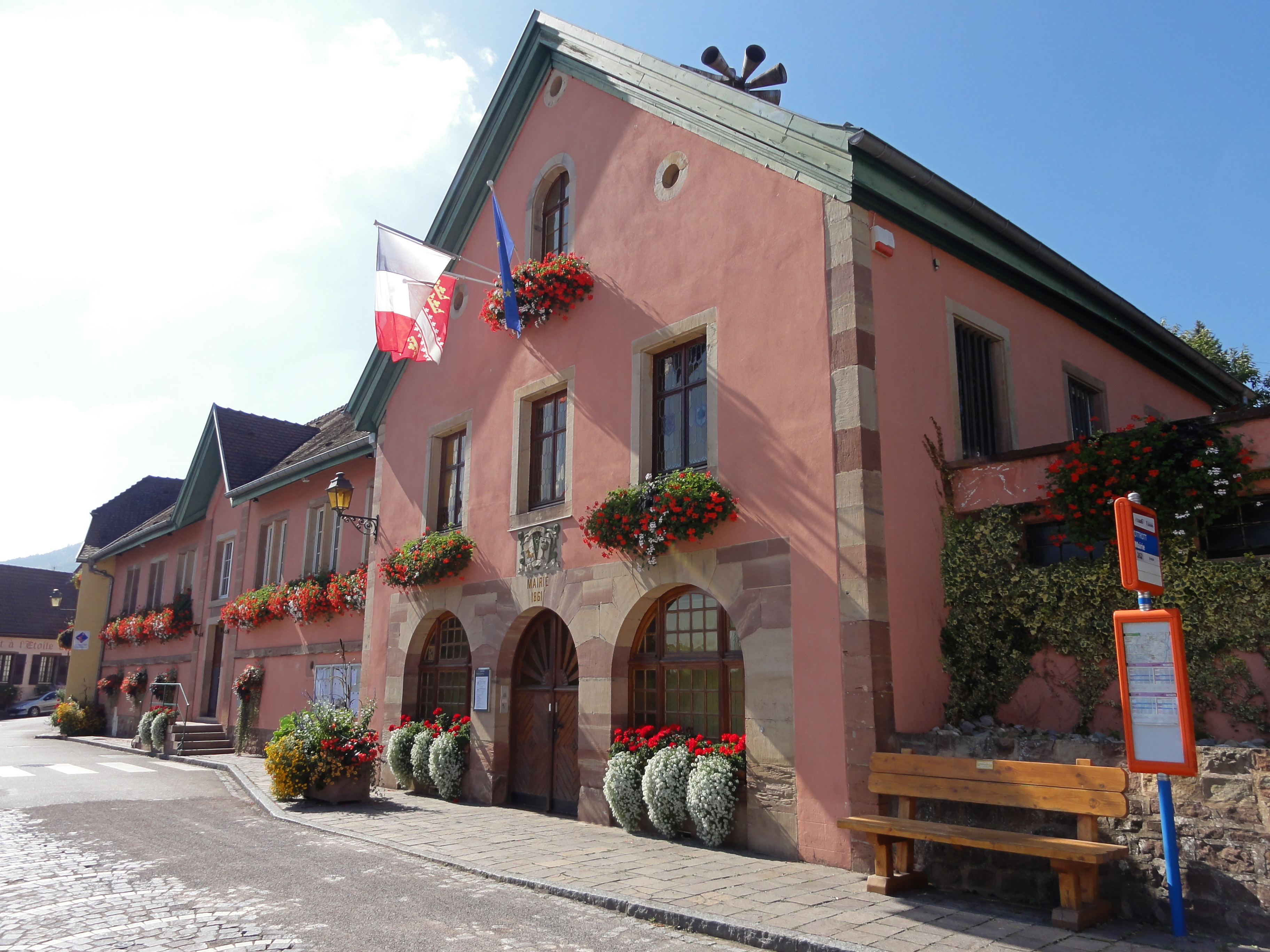 Alsace, Bas-Rhin, Ottrott, Mairie (XIXe), 44 rue Principale (1861): .